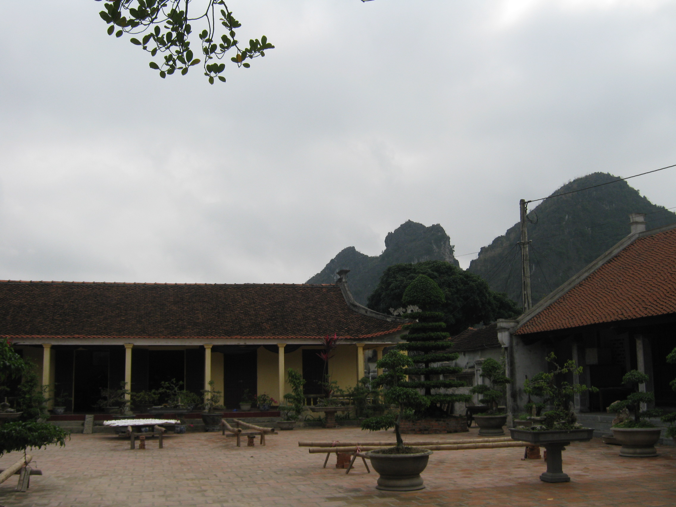 Nhất Trụ tự (Tràng An), nơi bảo quản 100 cột kinh Phật Đảnh Tôn Thắng Đà La Ni.